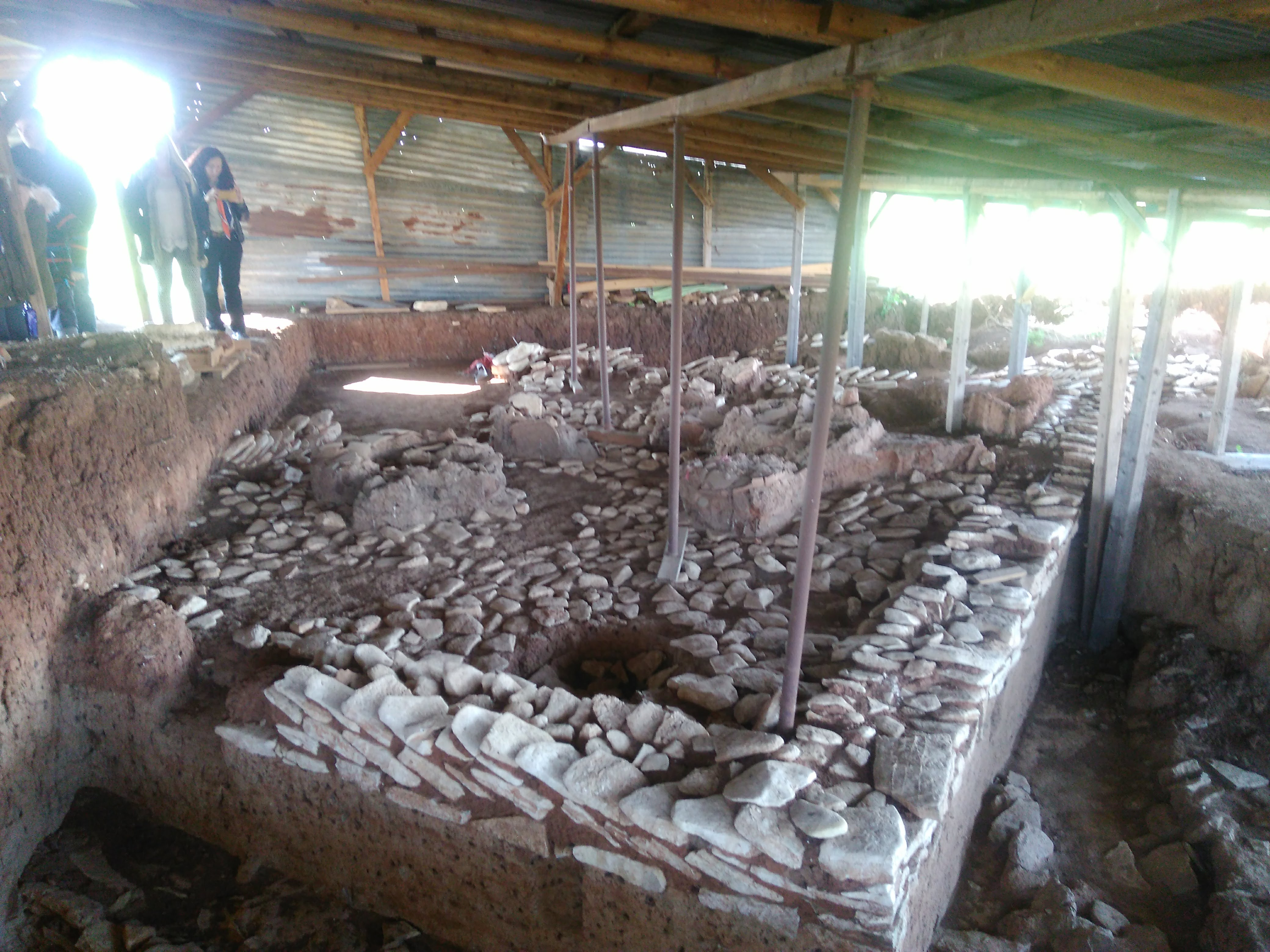 ΚΟΥΤΡΟΥΛΟΥ ΜΑΓΟΥΛΑ